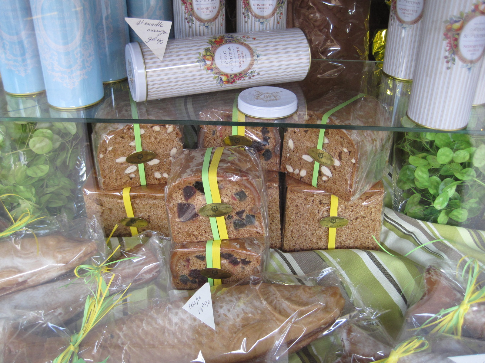 Pain d'épice Mulot & Petitjean - Dijon - Bourgogne